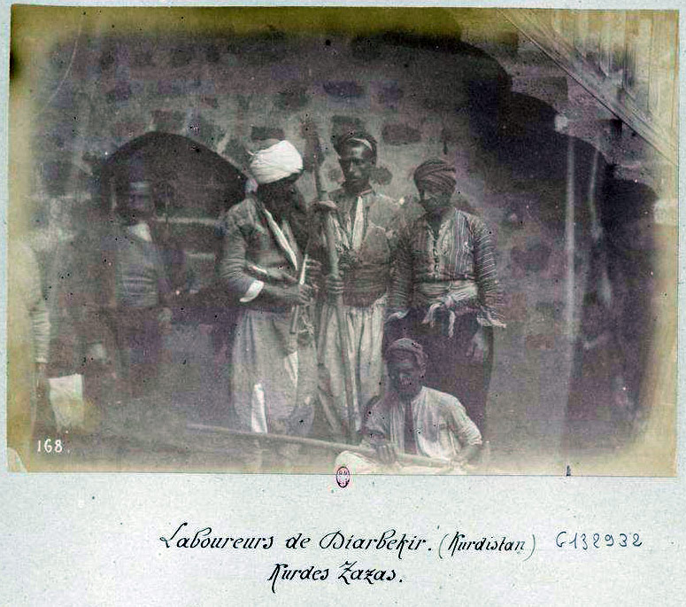 Laboureurs de Diarbekir (Kurdistan) Kurdes Zazas